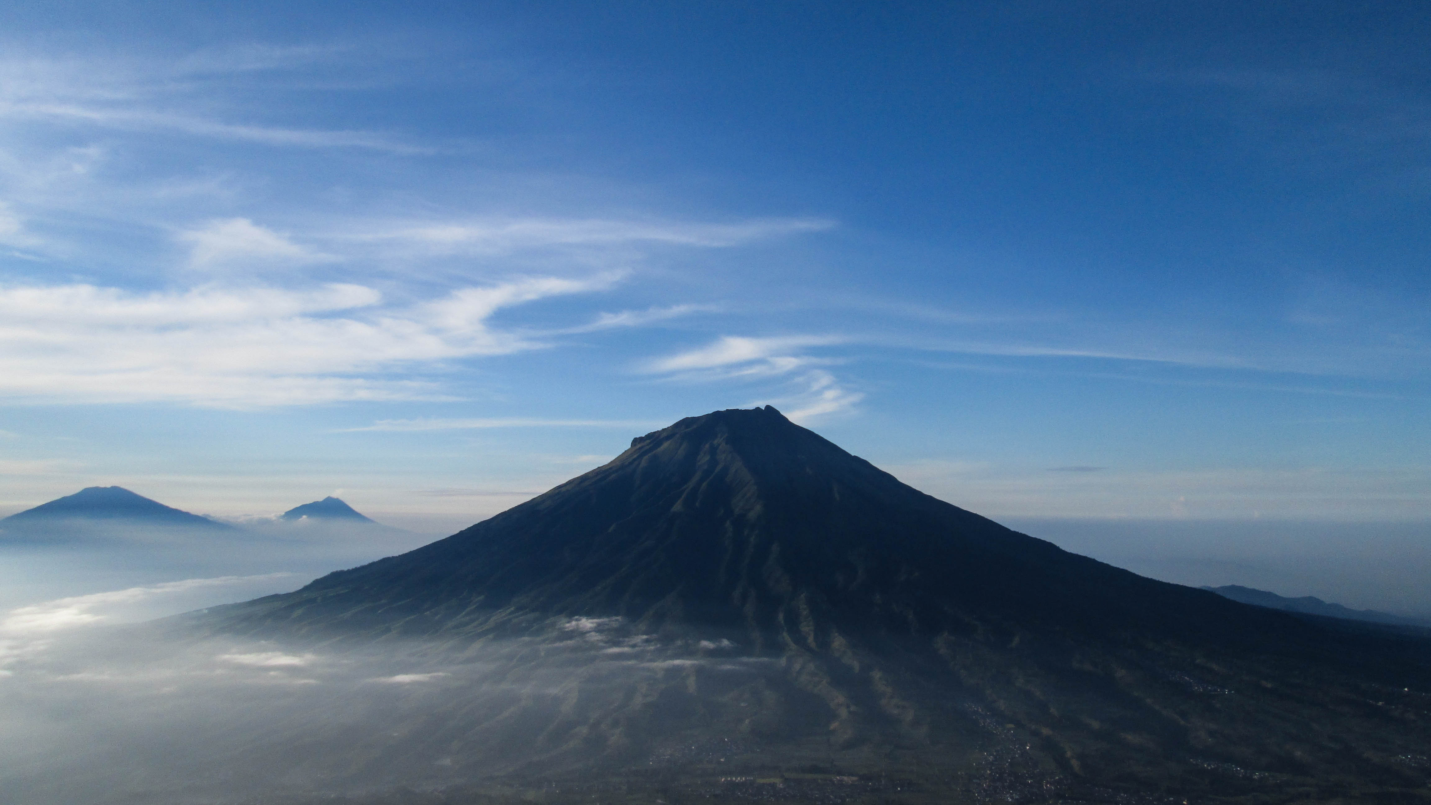 (Dari kiri) gunung Merbabu, Merapi, dan gunung Sumbing bagian lereng utara dilihat dari gunung Sindoro.